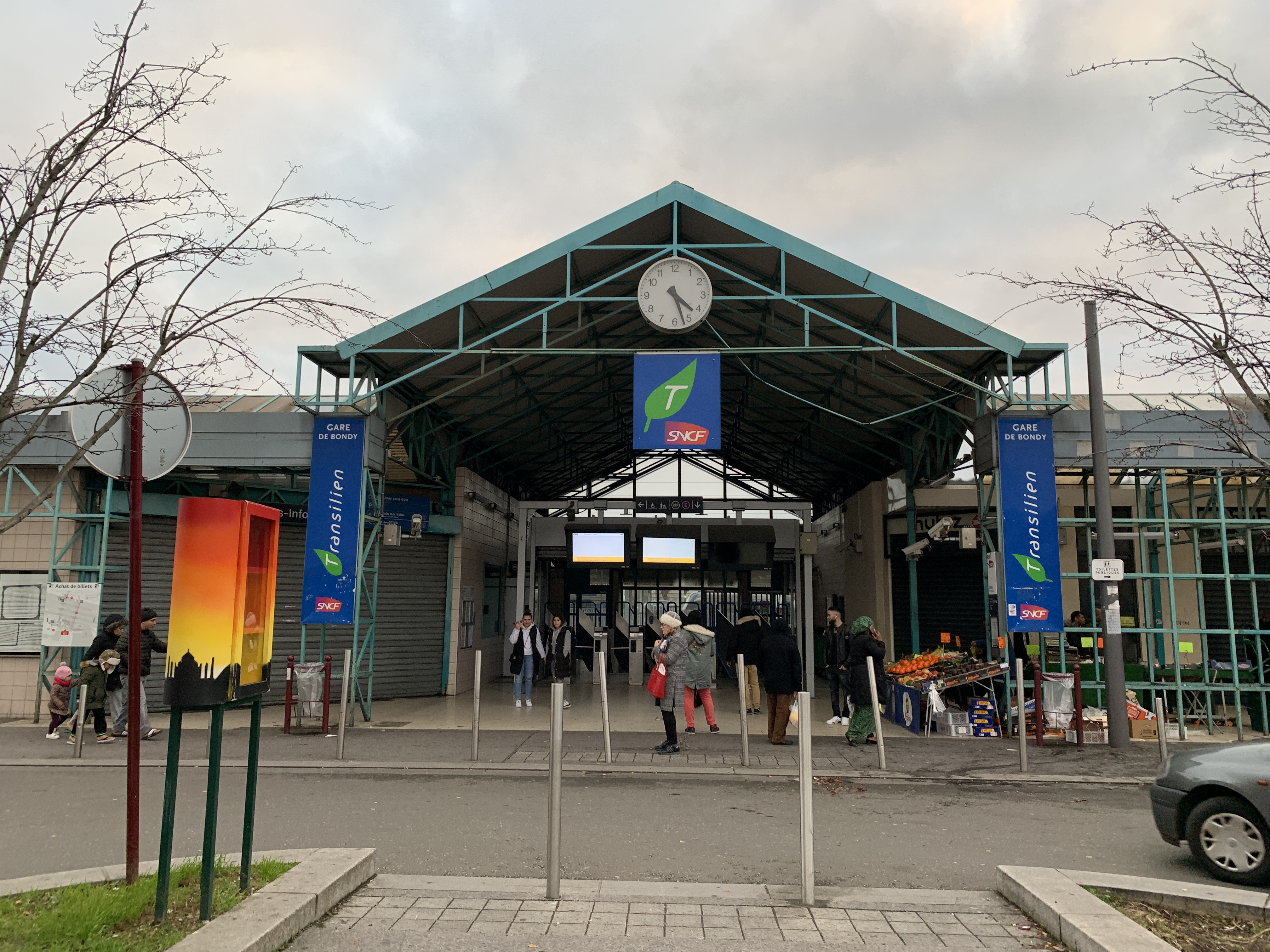 Gare de Bondy.